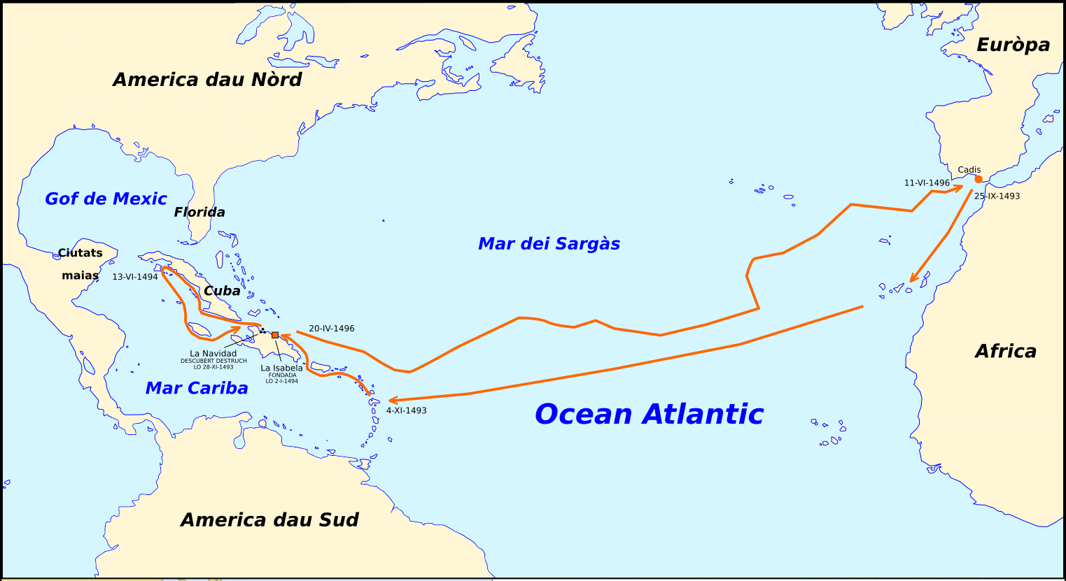 Trajècte de la segonda expedicion de Cristòl Colomb